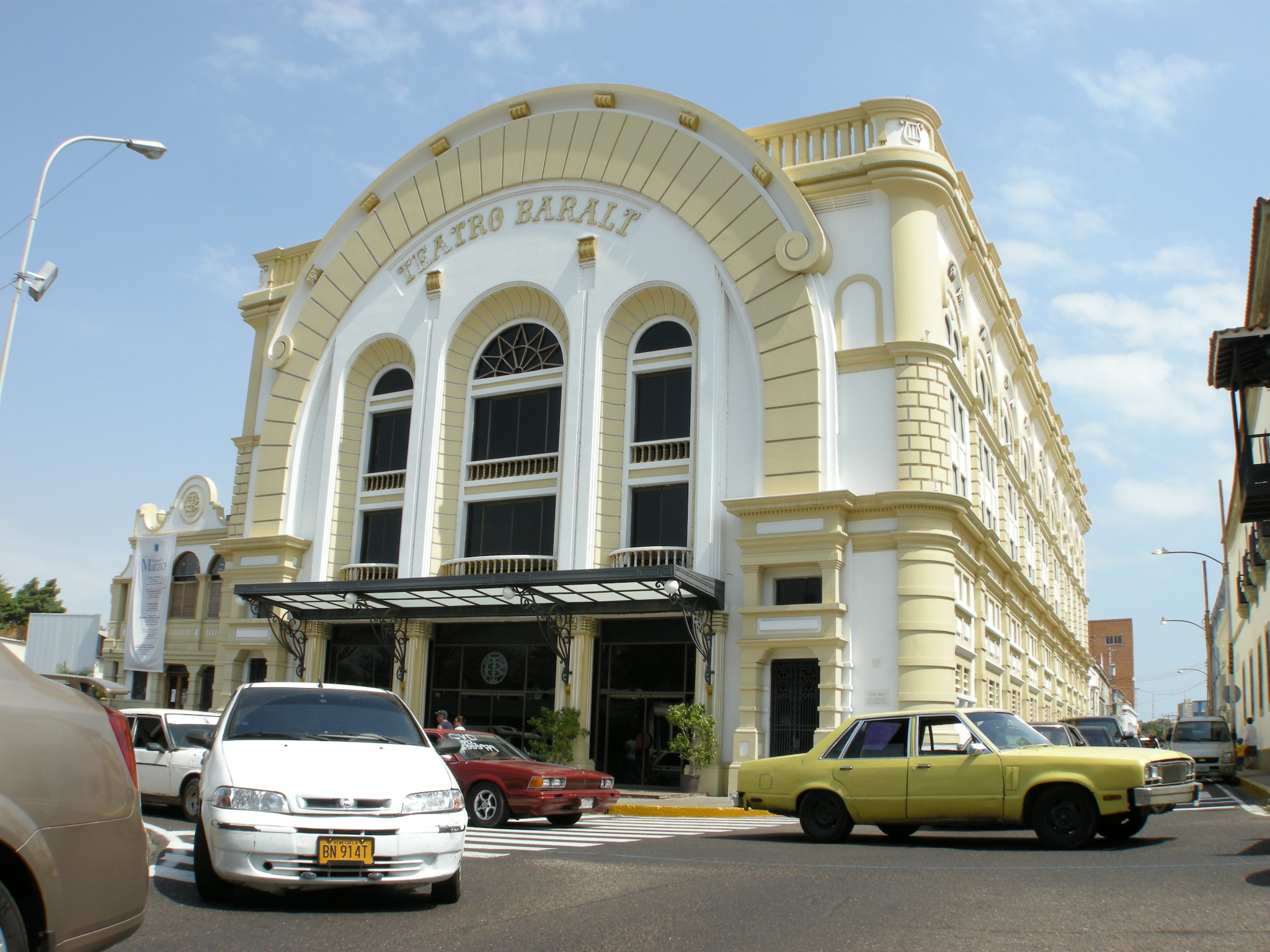 Teatro Baralt